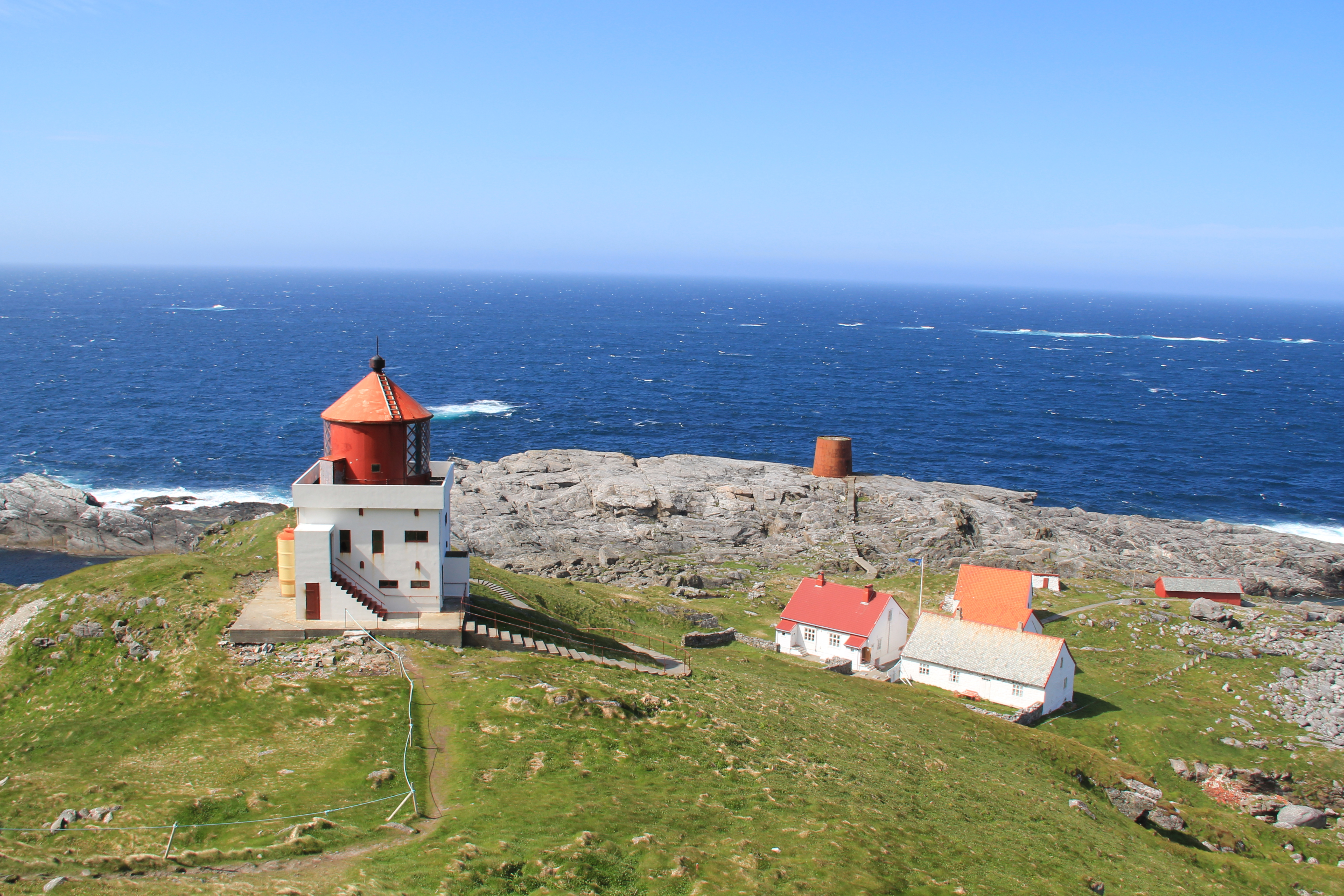 Runde lighthouse, june 2012